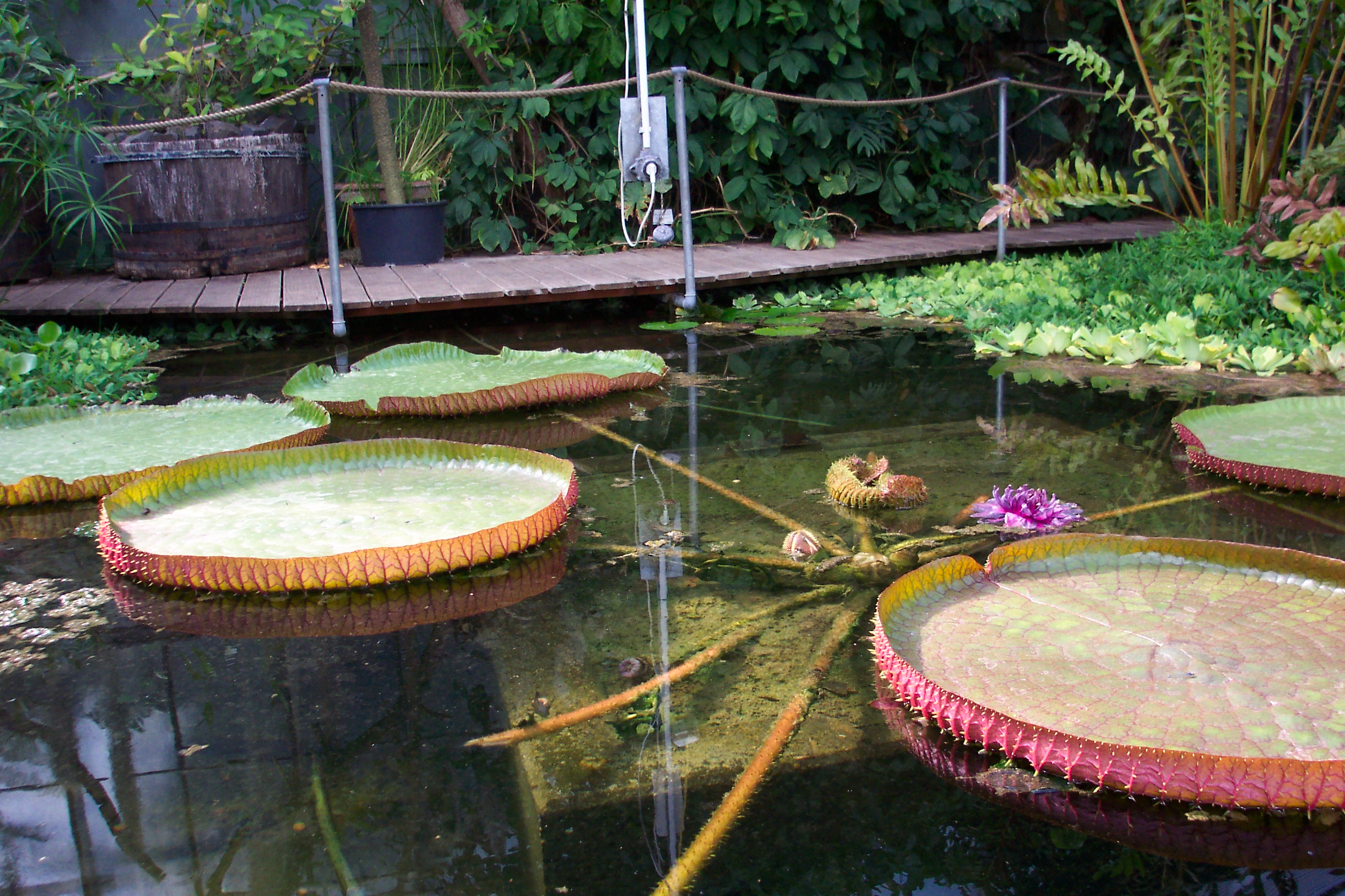 Riesenseerose (Victoria amazonica) im Neuen Botanischen Garten Marburg